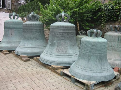 Clcohes dans la cour de la fonderie Cornille-Havard à Villedieu-les-Poêles (Manche) seraient les cloches de l'église Saint Sulpice de Paris